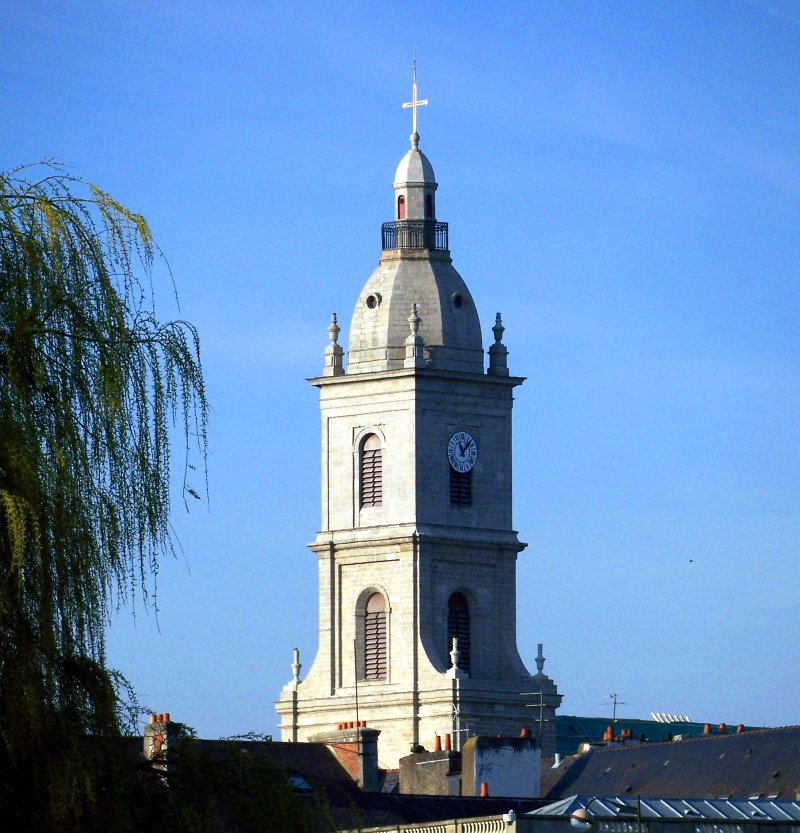 Clocher de l'église Saint Paterne de Vannes